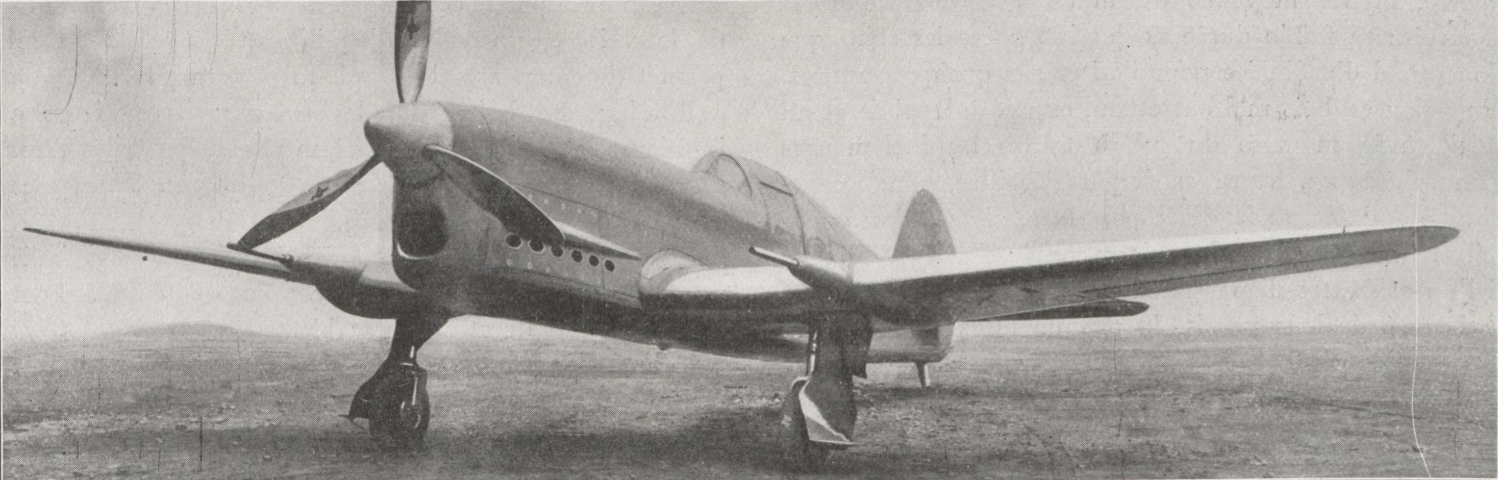 Aspect de trois-quarts avant du monoplace de chasse léger CAUDRON-RENAULT C. 713, à moteur RENAULT 12 R-01 450ch.